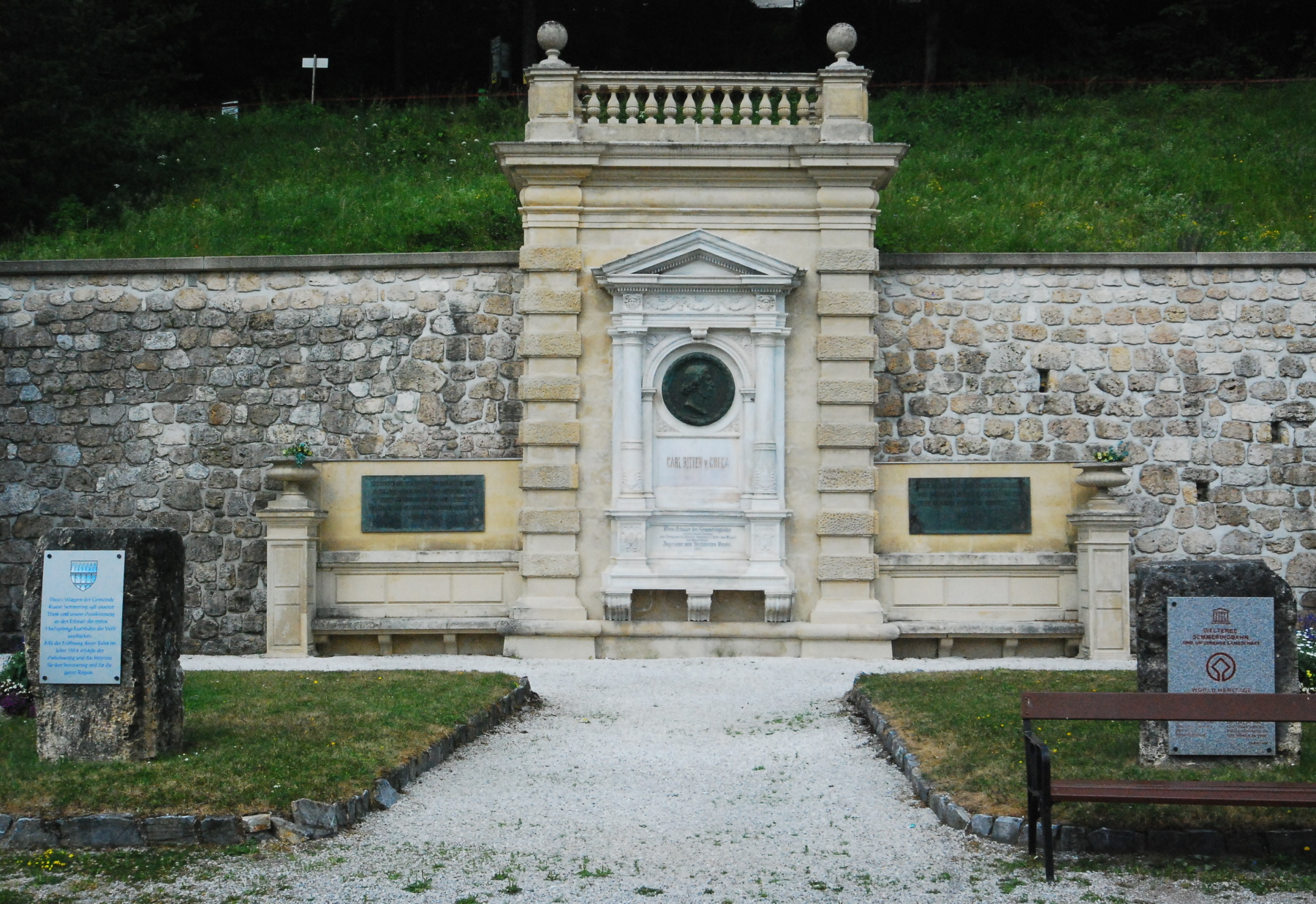 Das Ghegadenkmal am Bahnhof Semmering